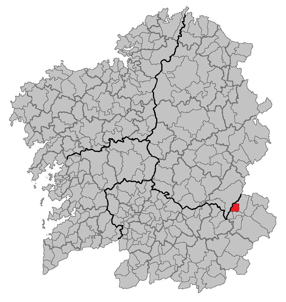 Mapa coa localización do concello de A Rúa.